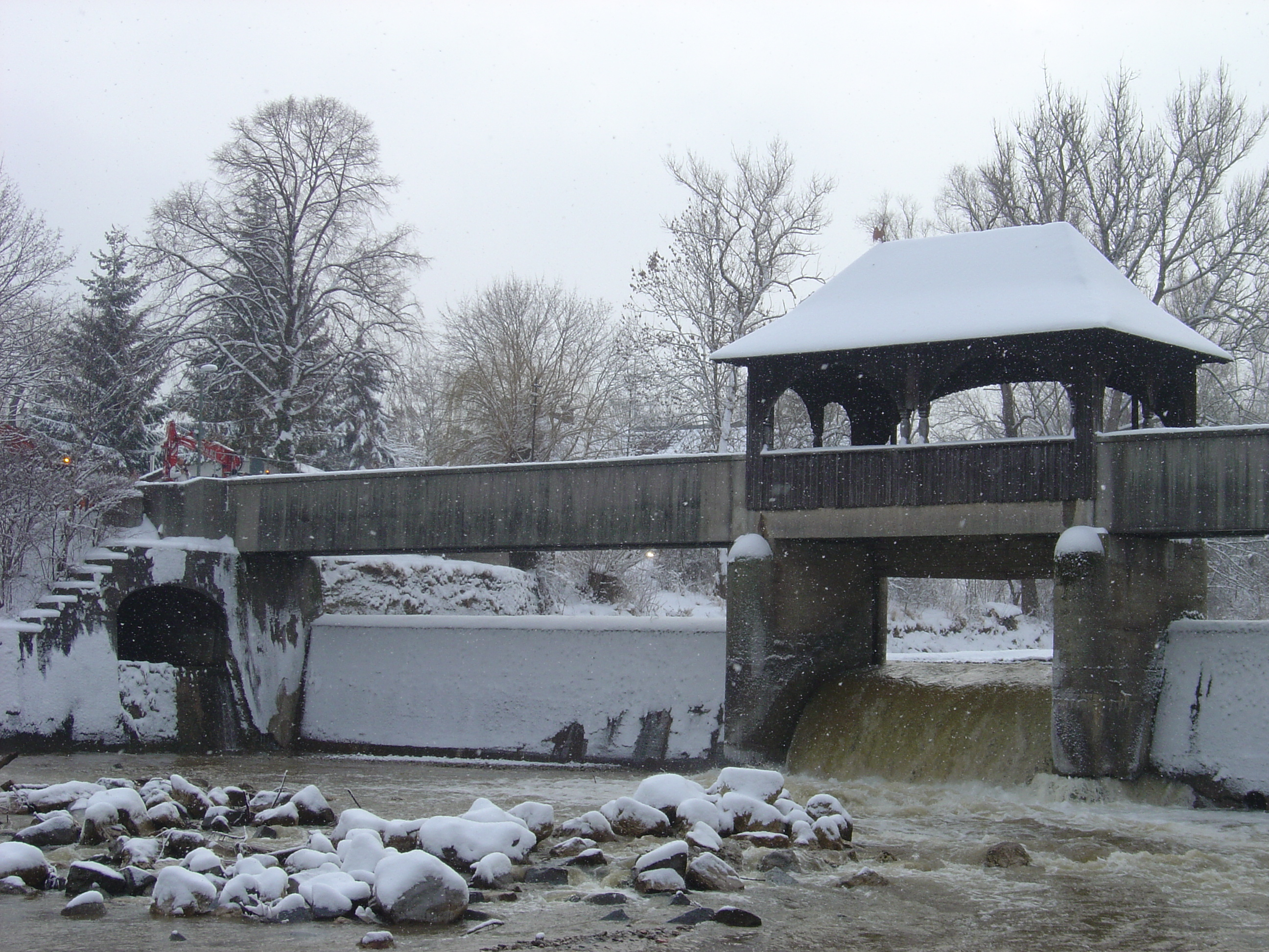 Das ehemalige Goggeleswehr und die Goggelesbrücke über die Wertach in Augsburg, im Winter.